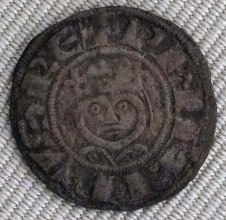 Capetingi, filippo II augusto, denaro, 1180-1223